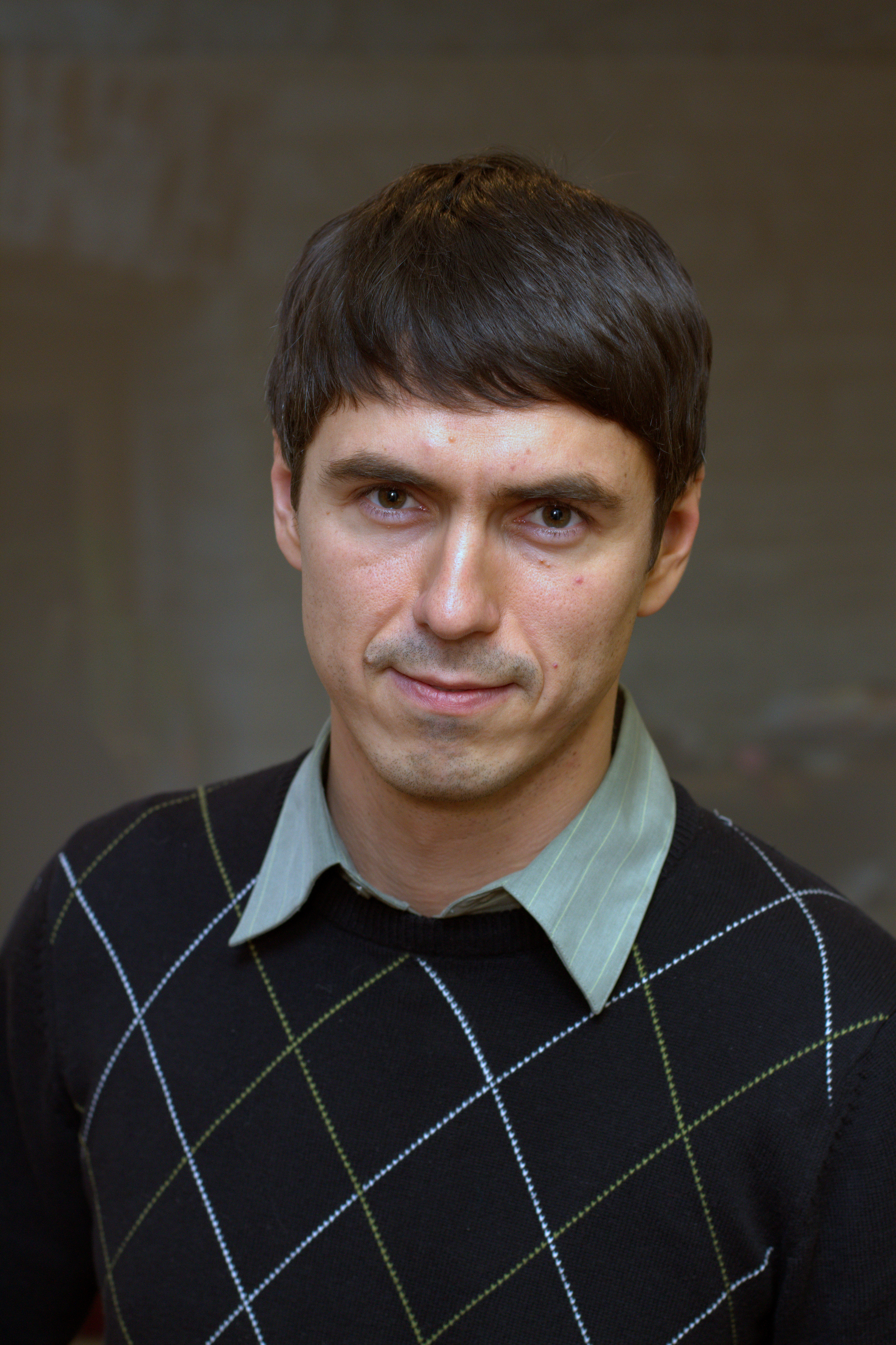 Urmo Kübar